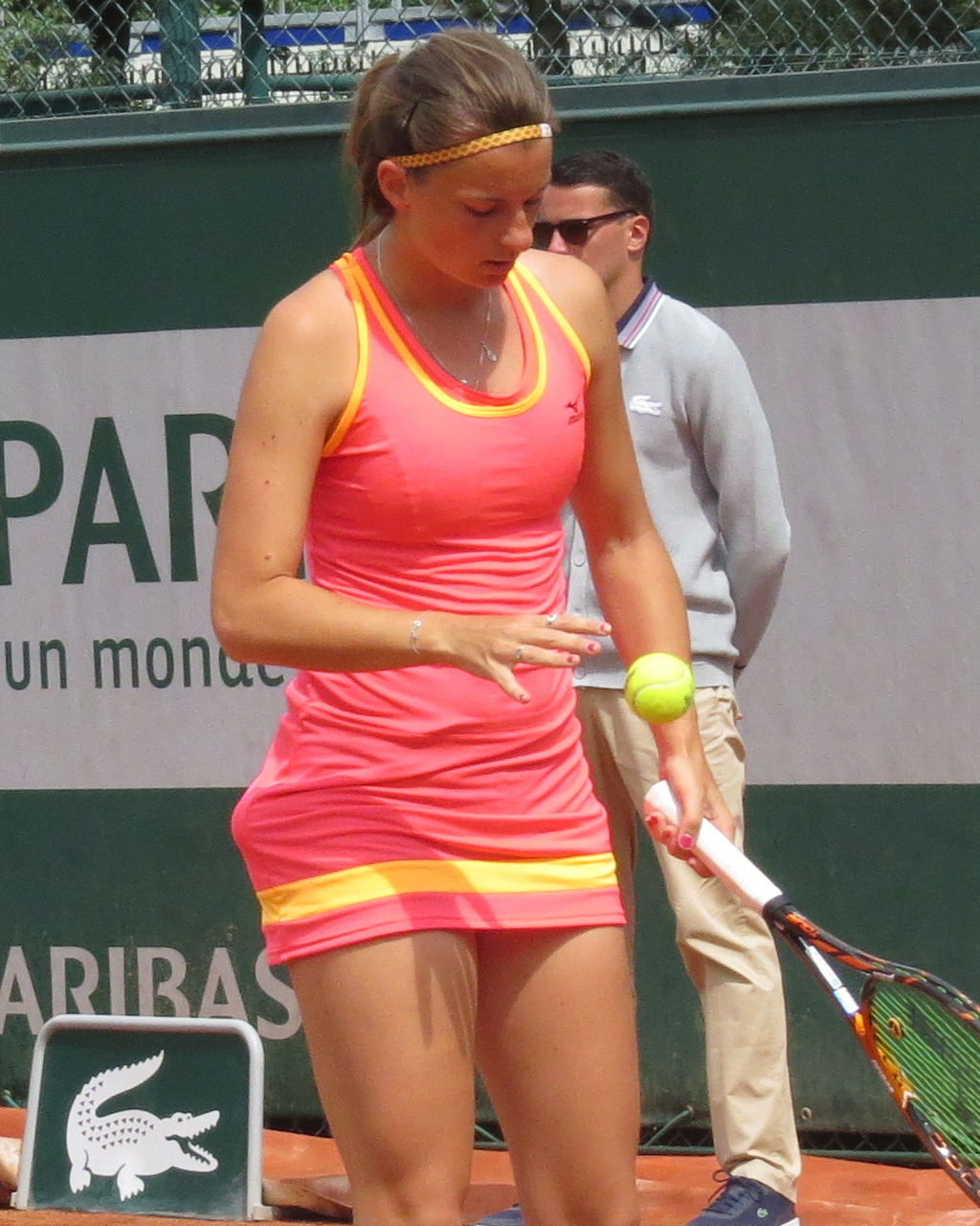 Quirine Lemoine lors de son premier tour des qualifications face à Lina Gjorcheska (court n°12)